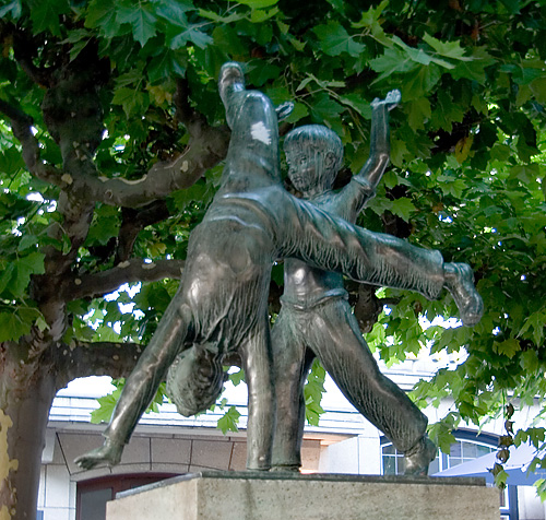 Radschlägerbrunnen Düsseldorf Burgplatz, von Alfred Zschorsch